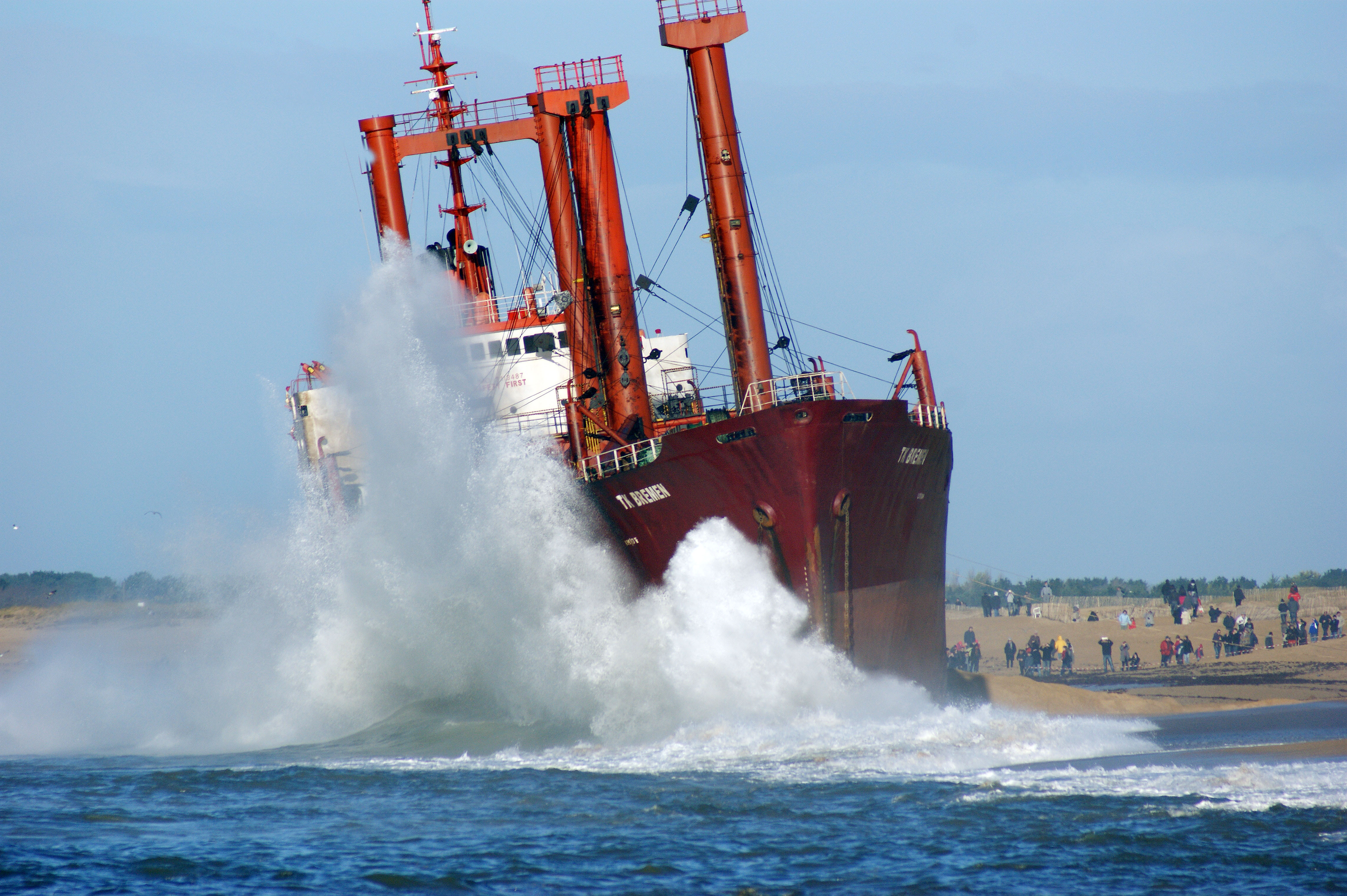 Le lendemain de l'échouage à Erdeven, l'assaut des vagues de la marée montante sur la coque du TK Bremen. Information about TK Bremen may be found at IMO 8113487. A ship can change name and flag state through time, but the IMO number remains the same through the hull's entire lifetime. As a result, it can be useful to identify a ship by using the IMO number.